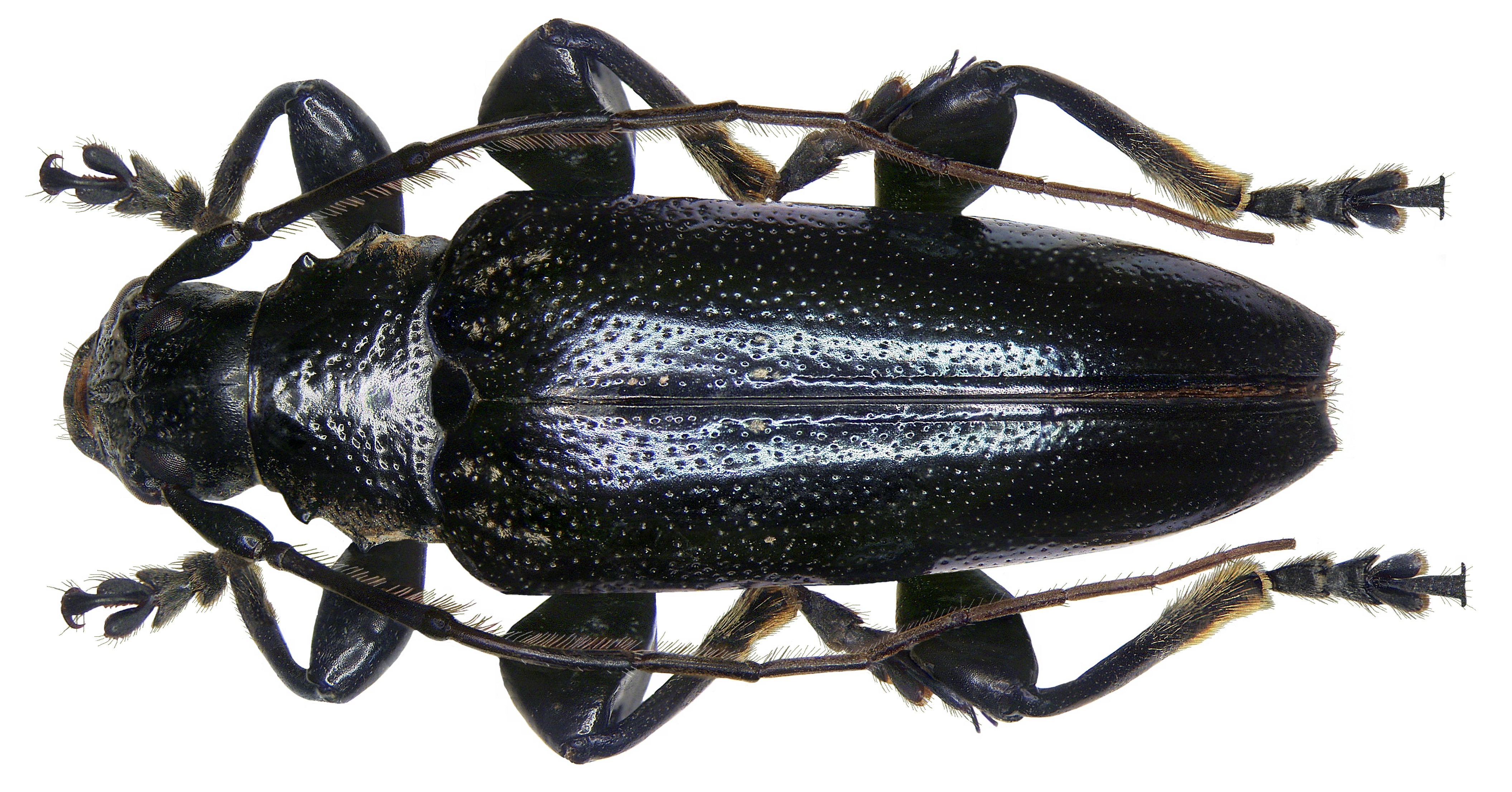 Familie: Cerambycidae Größe: 24 mm Fundort: Papua Neuguinea det. Heller Holotypus, Coll. Museum Dresden Foto: U.Schmidt, 2008